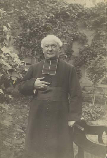 Le curé Hermas Baffrey de Rombach-le-Franc (1903-1922) qui a inauguré la chapelle de la Hingrie